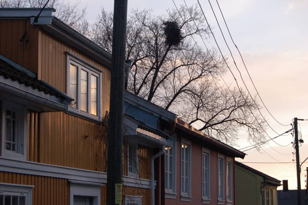 Scene from Skedsmogata, Kampen, Oslo